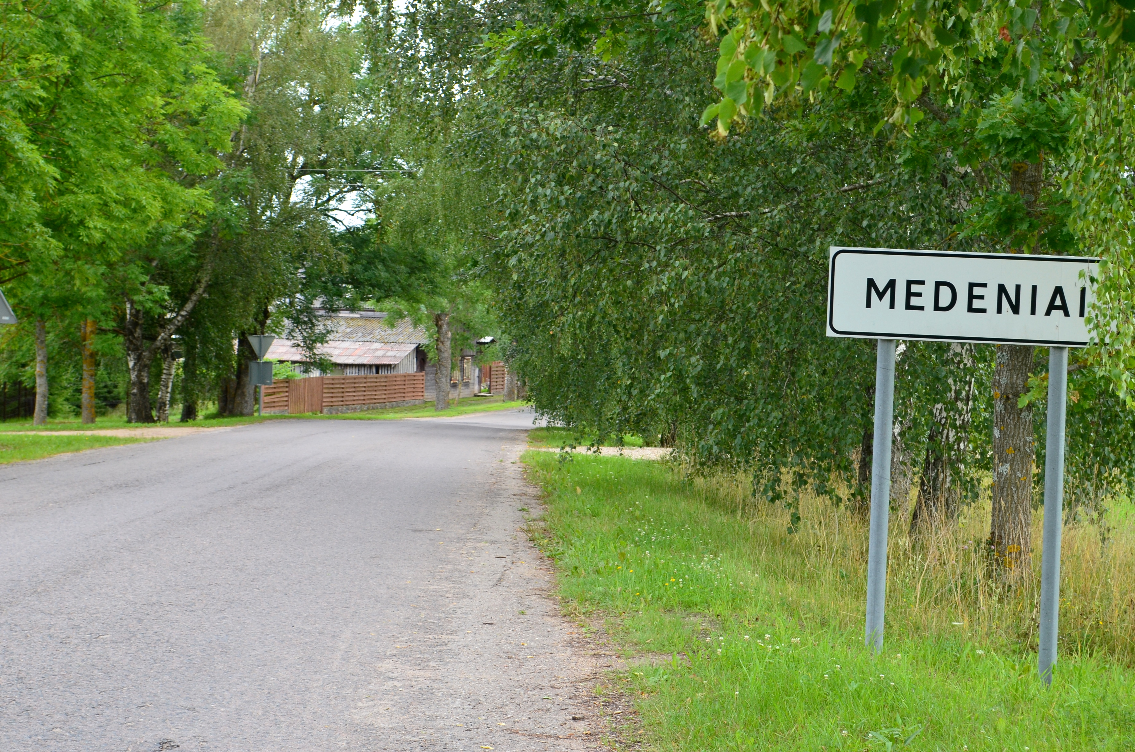 Medeniai, Utenos raj.